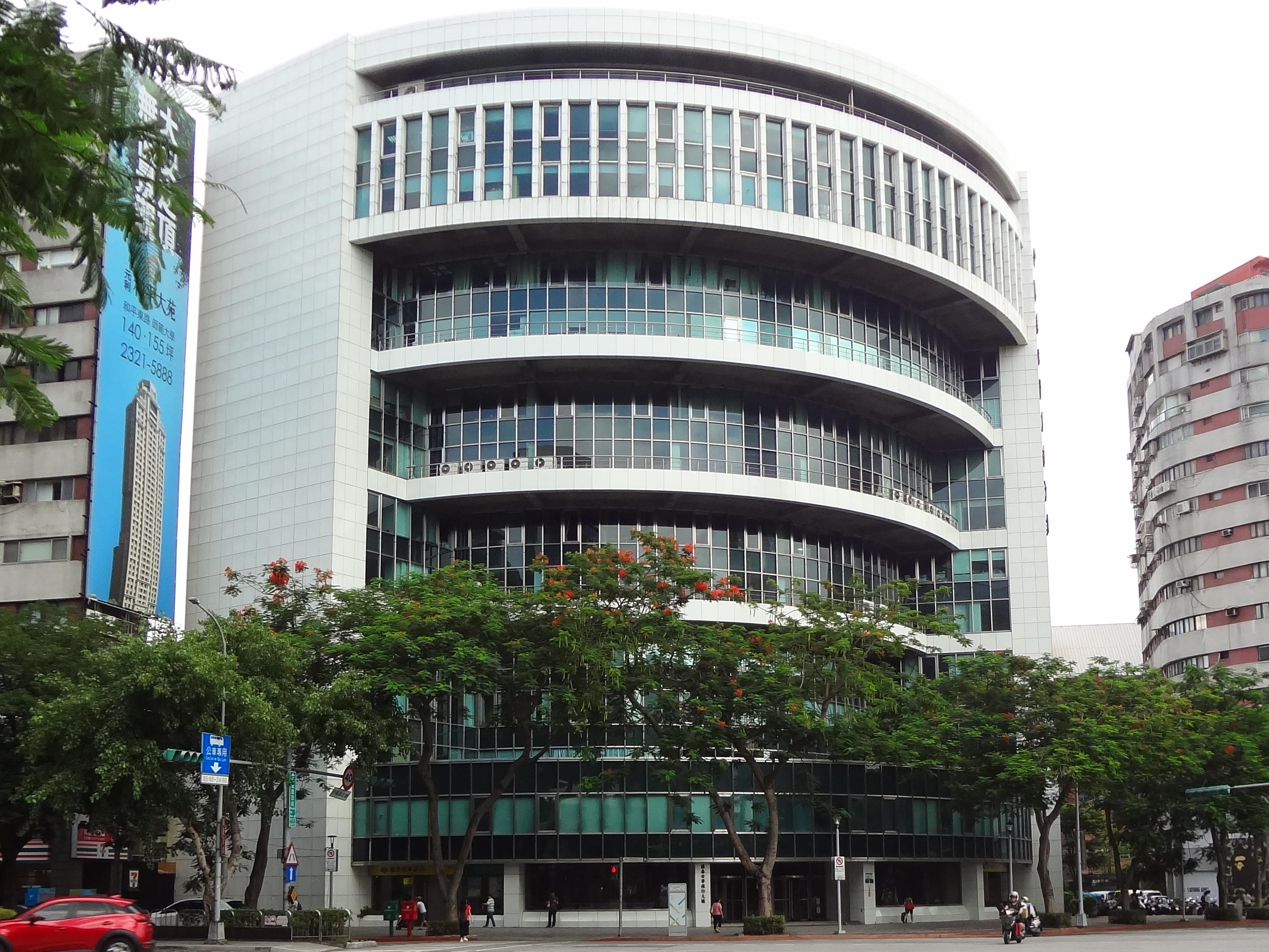 國泰世華銀行仁愛大樓，位於臺北市大安區仁愛路四段85號。